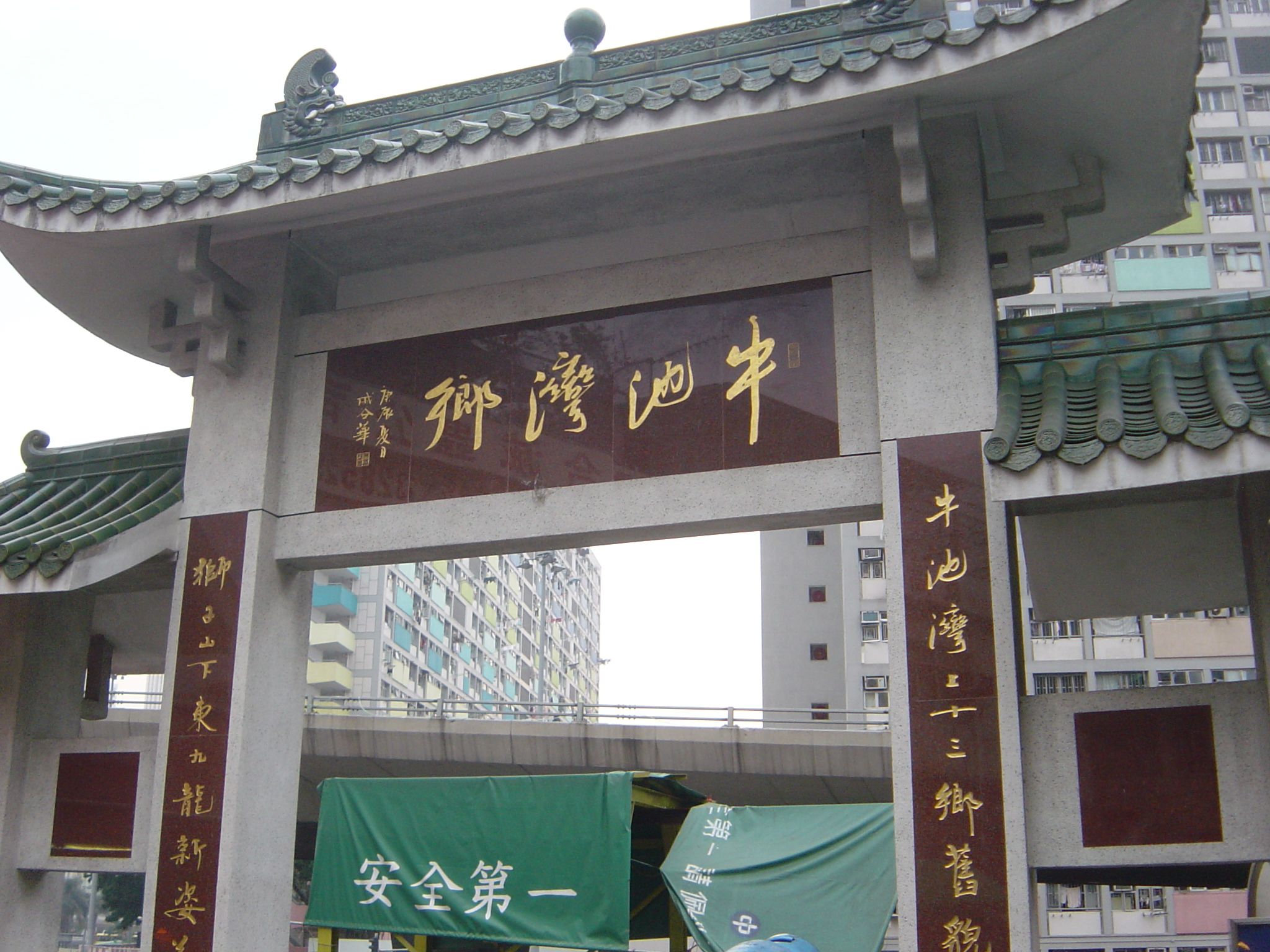 香港牛池灣鄉。Ngau Chi Wan Village, Hong Kong.